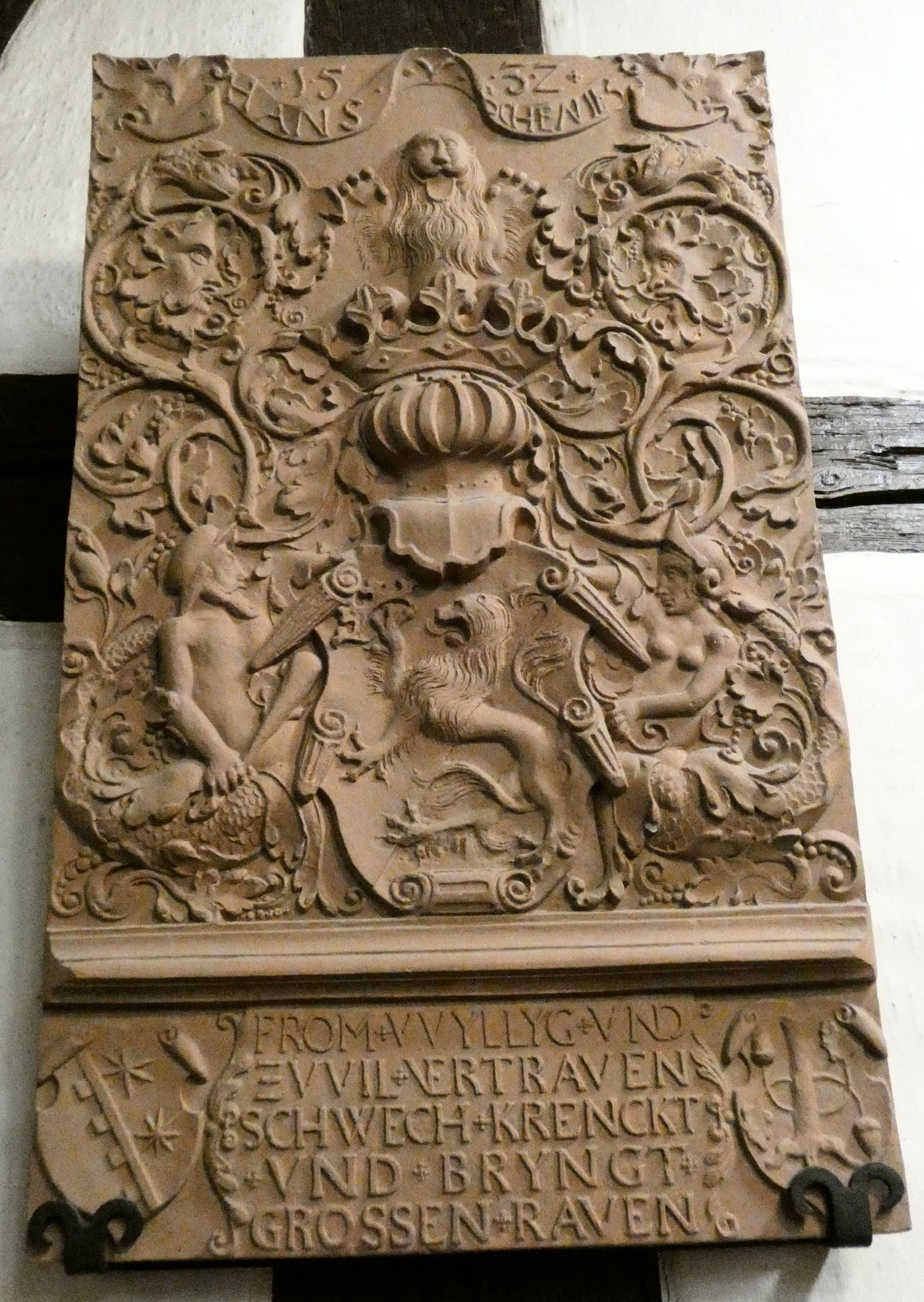 Gipsabguss der Hauszeichentafel von 1532 aus dem Stadtpalais Kühler Brunnen mit dem Wappen des Hans von Schönitz, Technisches Halloren- und Salinemuseum Halle (Saale)